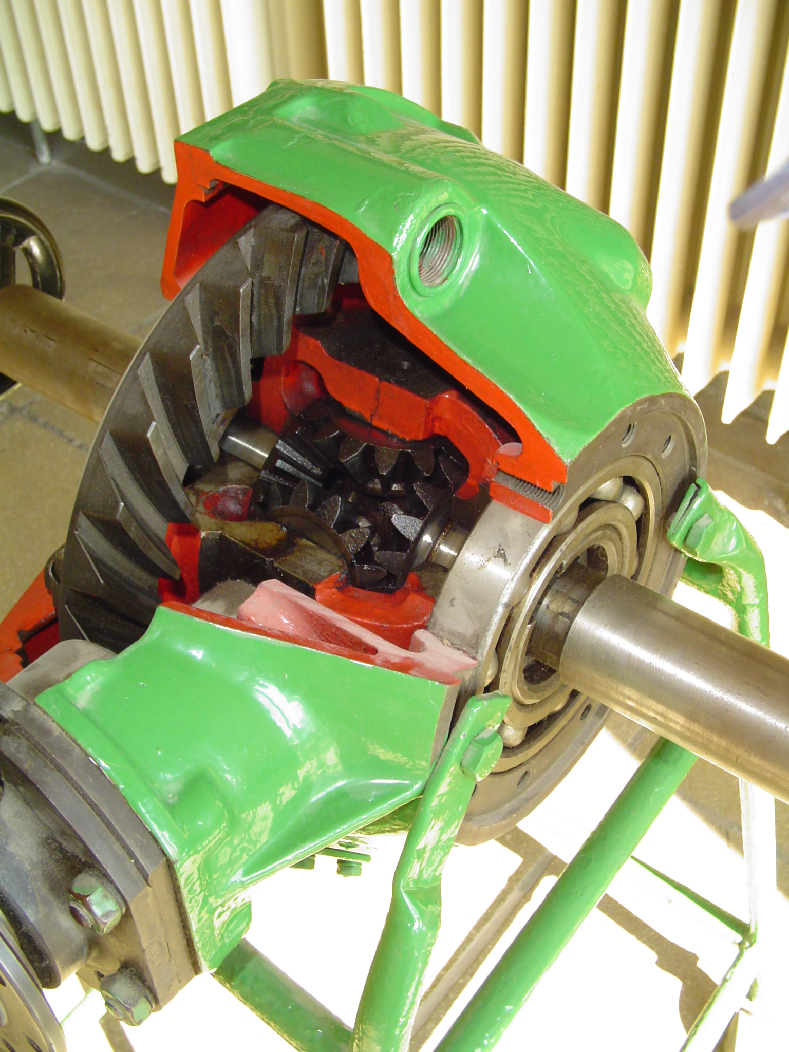 Aufgenommen in der TU Chemnitz. Leistung verzweigendes Getriebe.